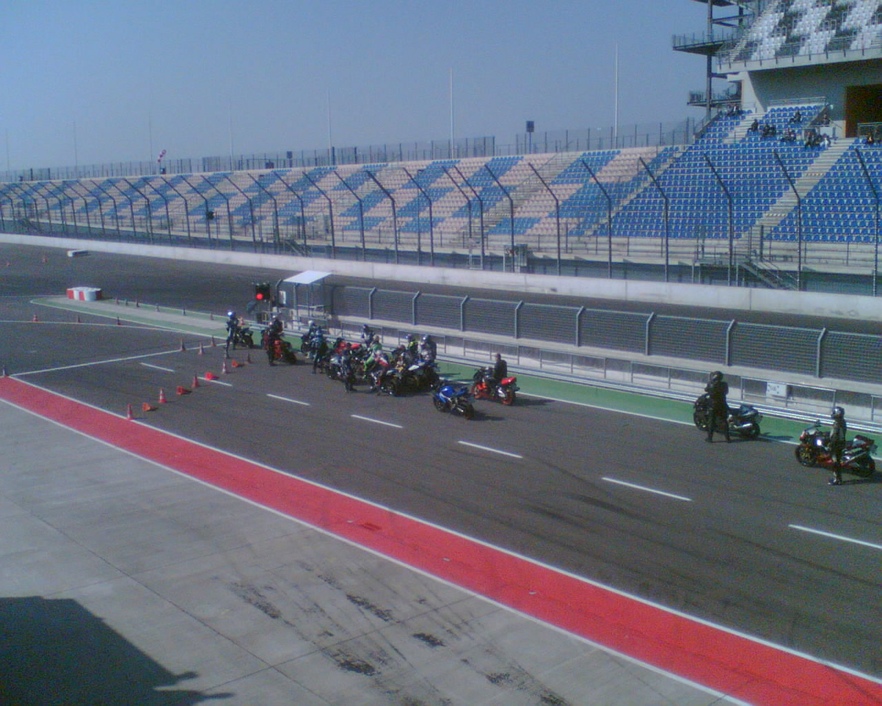 Eurospeedway Lausitz, Ende der Zielgeraden und Boxenausfahrt